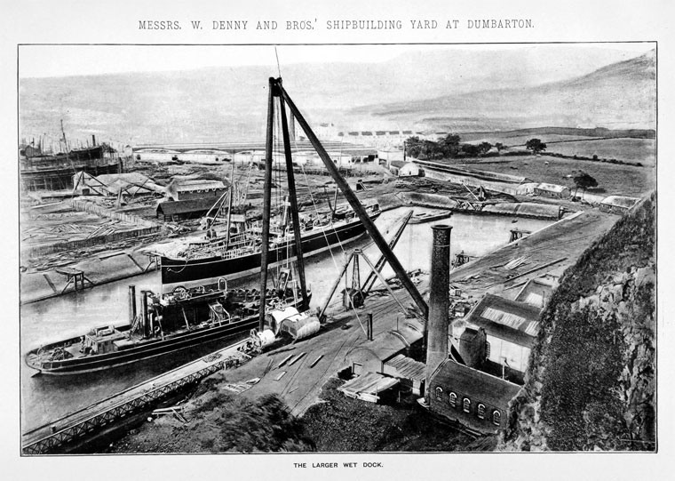 Messrs. W. Benny & Bros' Shipbuilding Yard at Dumbarton - The larger wet dock